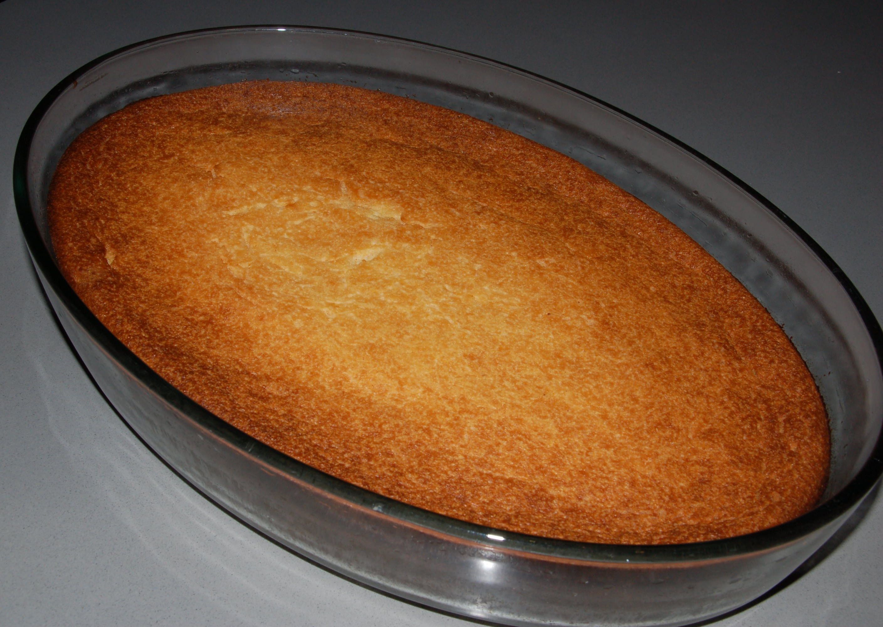 מלאי.